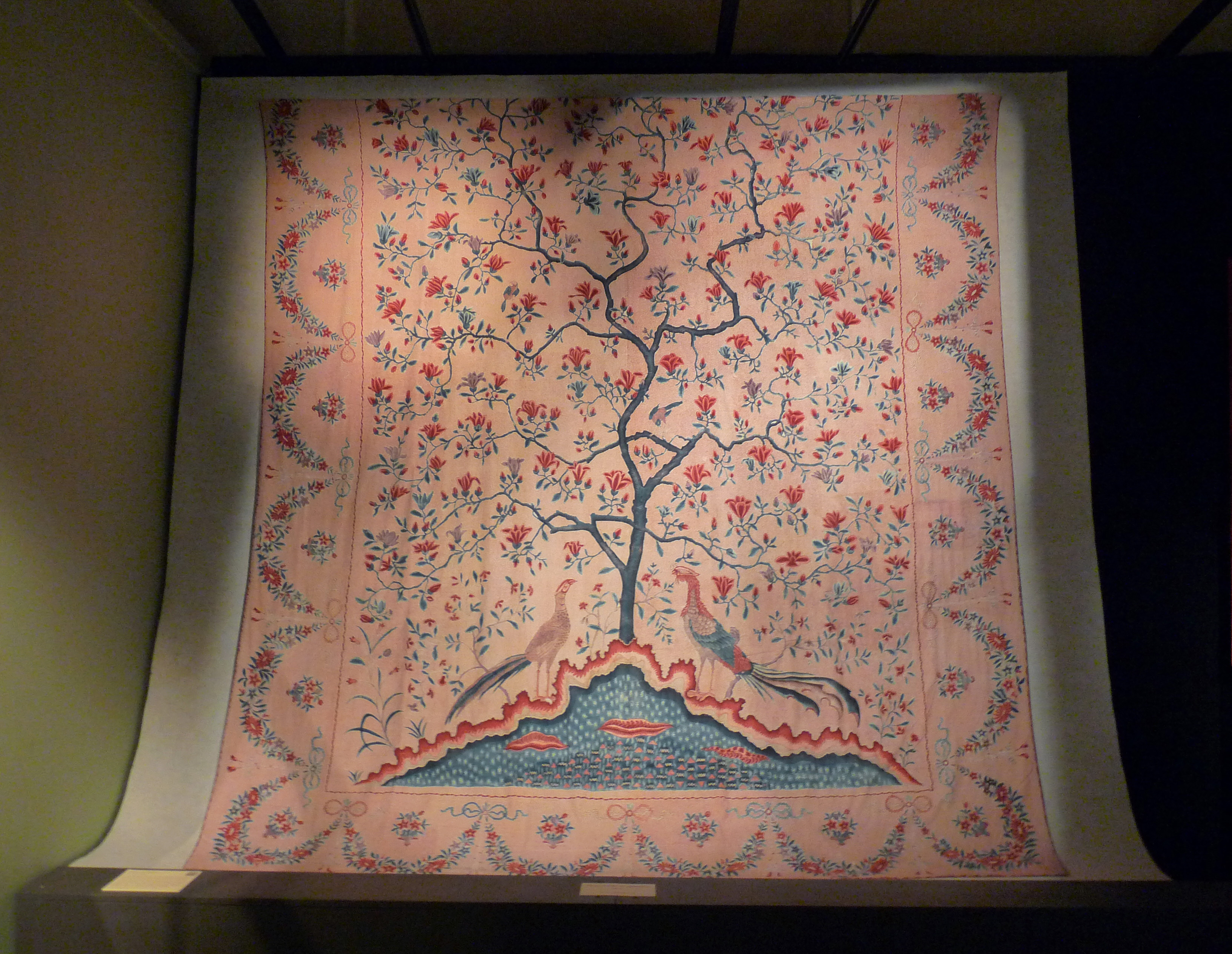 Palempore aux magnolias. Coton peint teint par mordançage et réserve. Inde, Côte de Coromandel. Premier quart du 18e siècle. Musée de la Compagnie des Indes (Lorient)